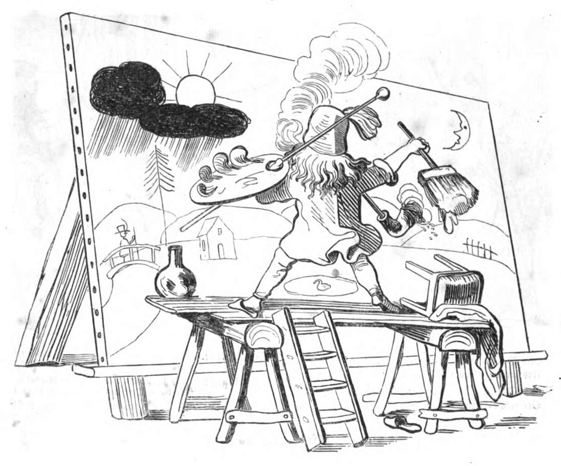 Fliegende Blätter, Volume 1, image on page 23